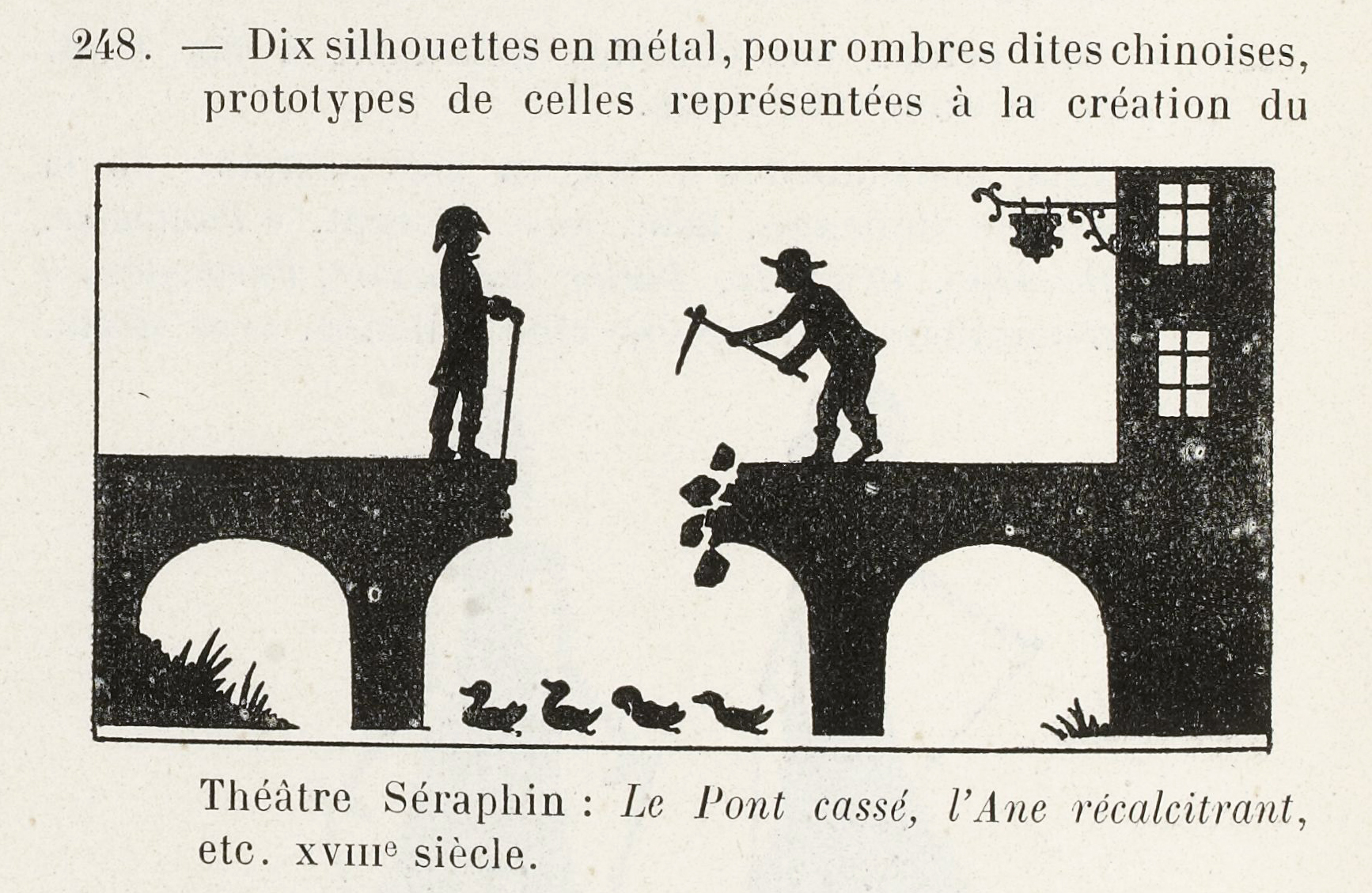 Illustration from Poupées, marionnettes, silhouettes provenant en grande partie du Théâtre Séraphin.